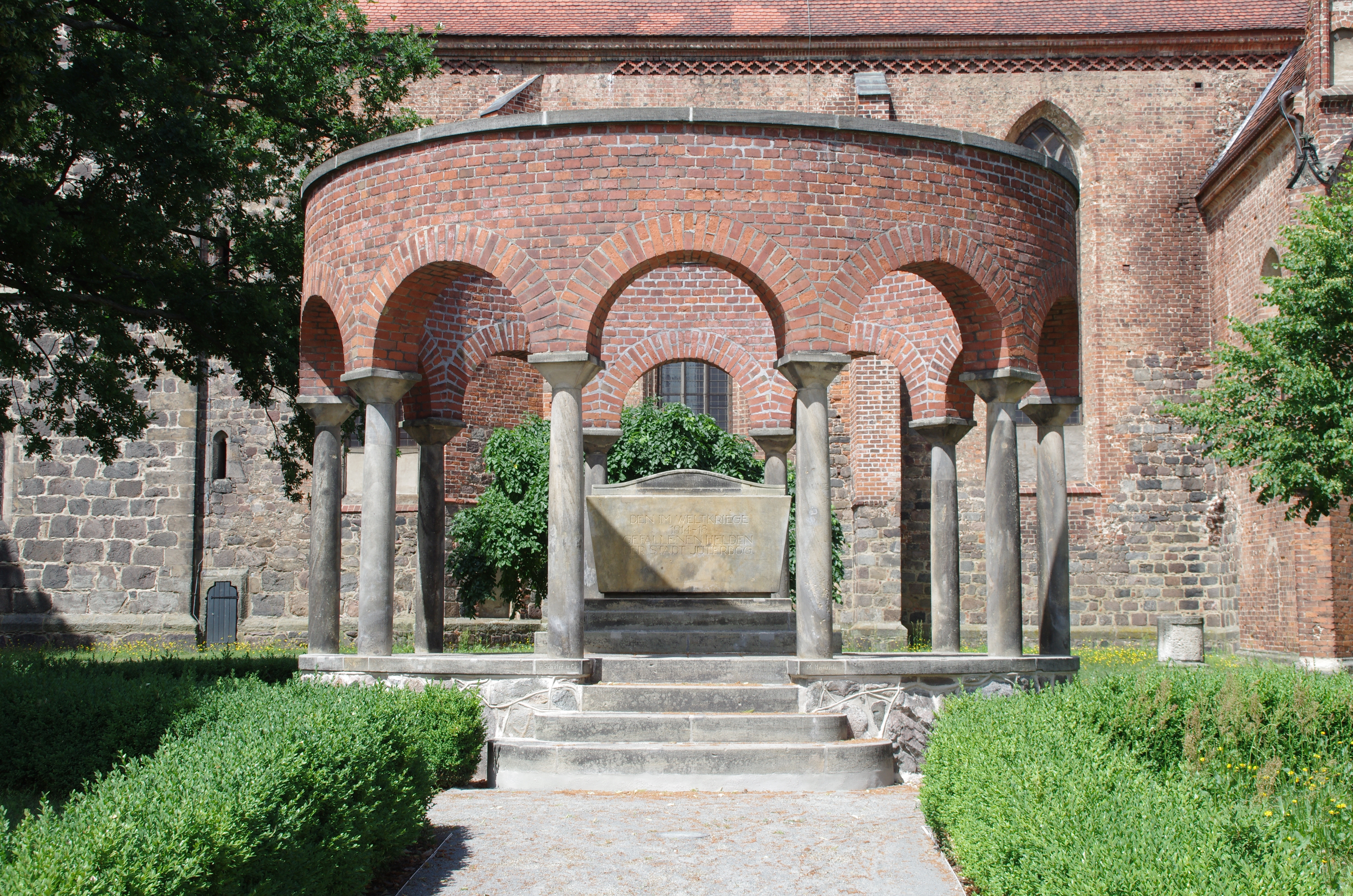 Jüterbog in Brandenburg. Das Kriegerdenkmal befindet sich auf dem Nikolaikirchhof südlich der Nikolaikirche und nördlich der Großen Straße. Das Denkmals steht unter Denkmalschutz.